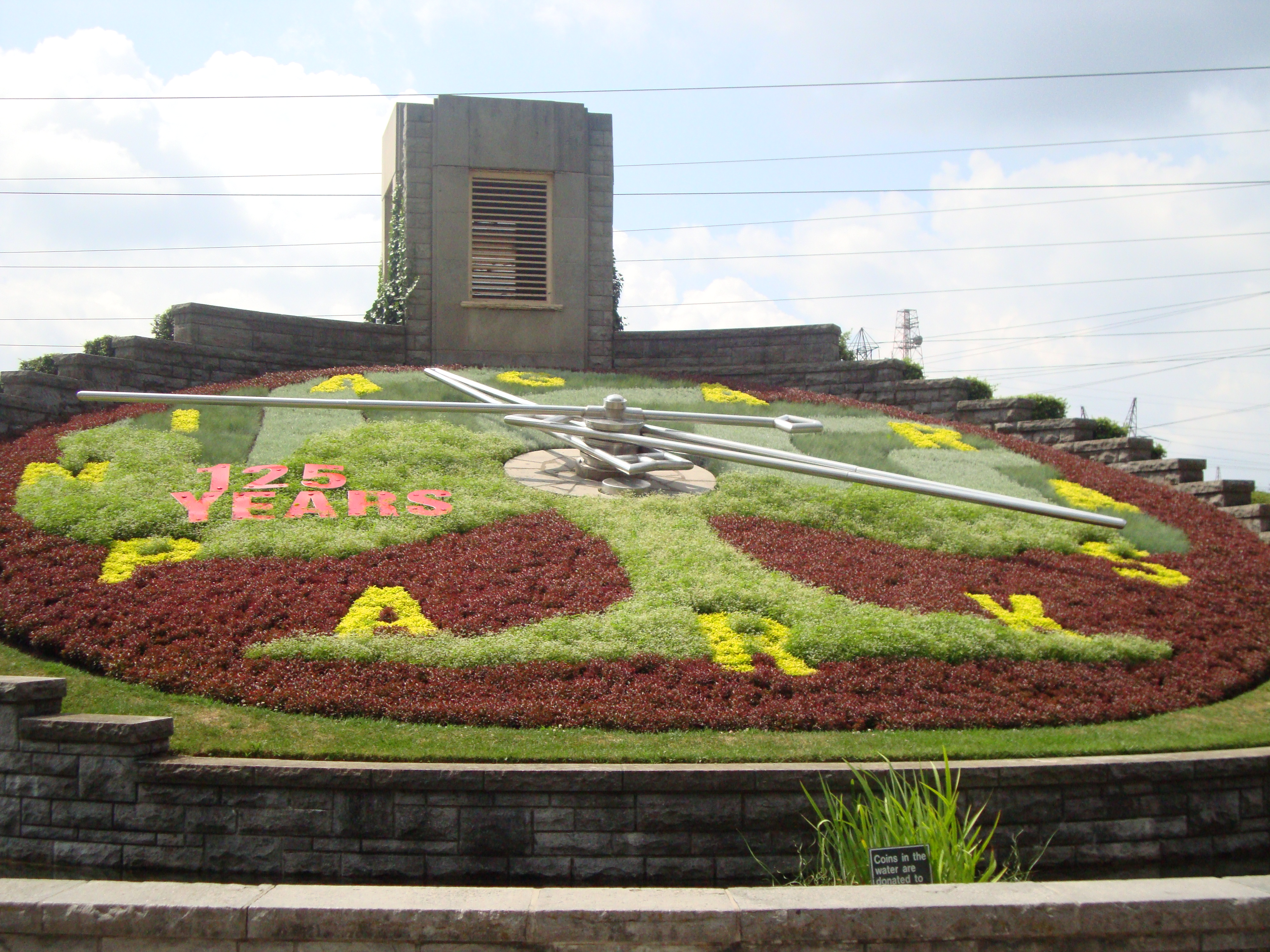 Floral Clock, Niagara Falls, Ontario, Canada